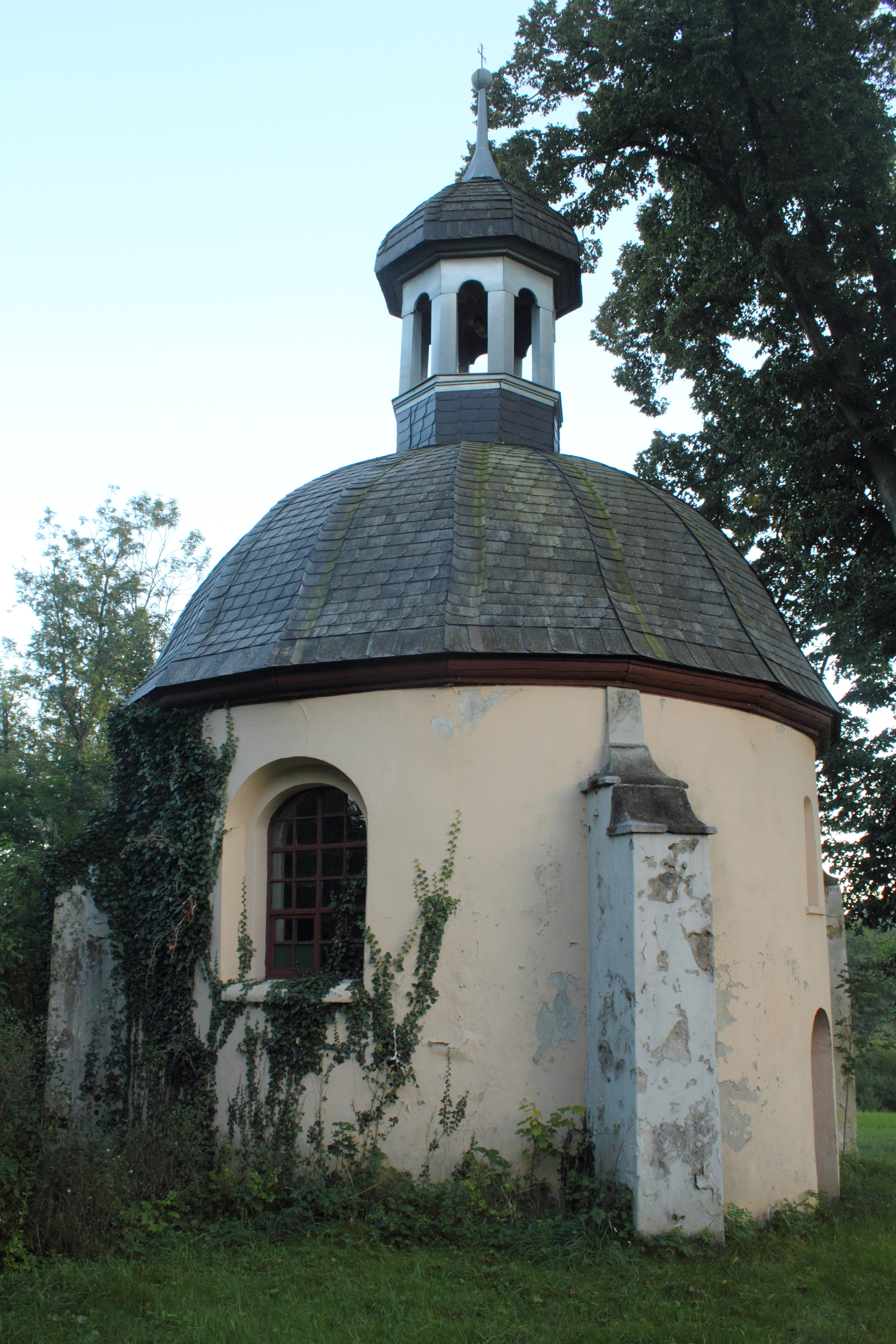 Kaple Navštívení Panny Marie, Hoření Starý Dub